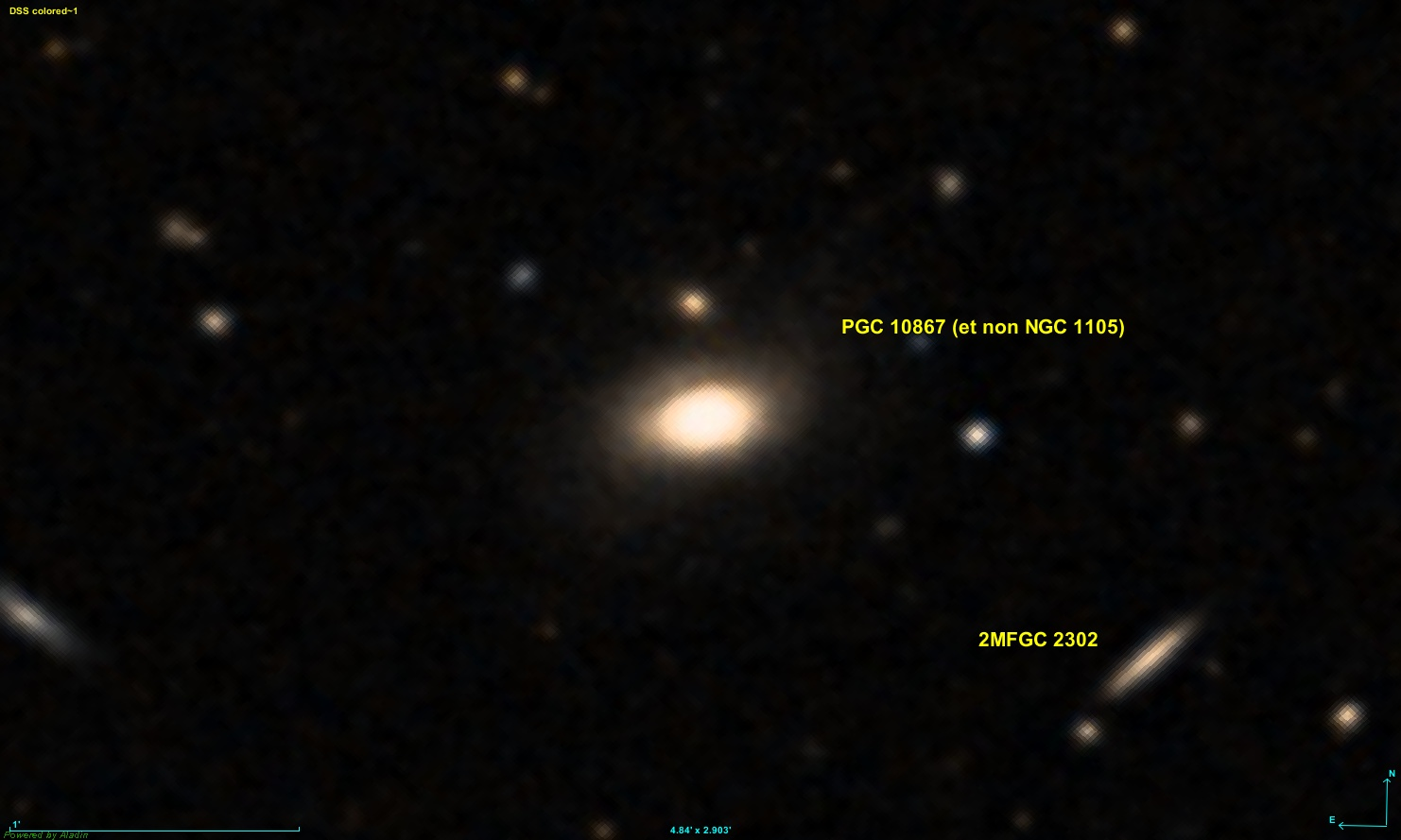 Image créée à l'aide du logiciel Aladin Sky Atlas du Centre de Données astronomiques de Strasbourg et des données de DSS (Digitized Sky Survey).